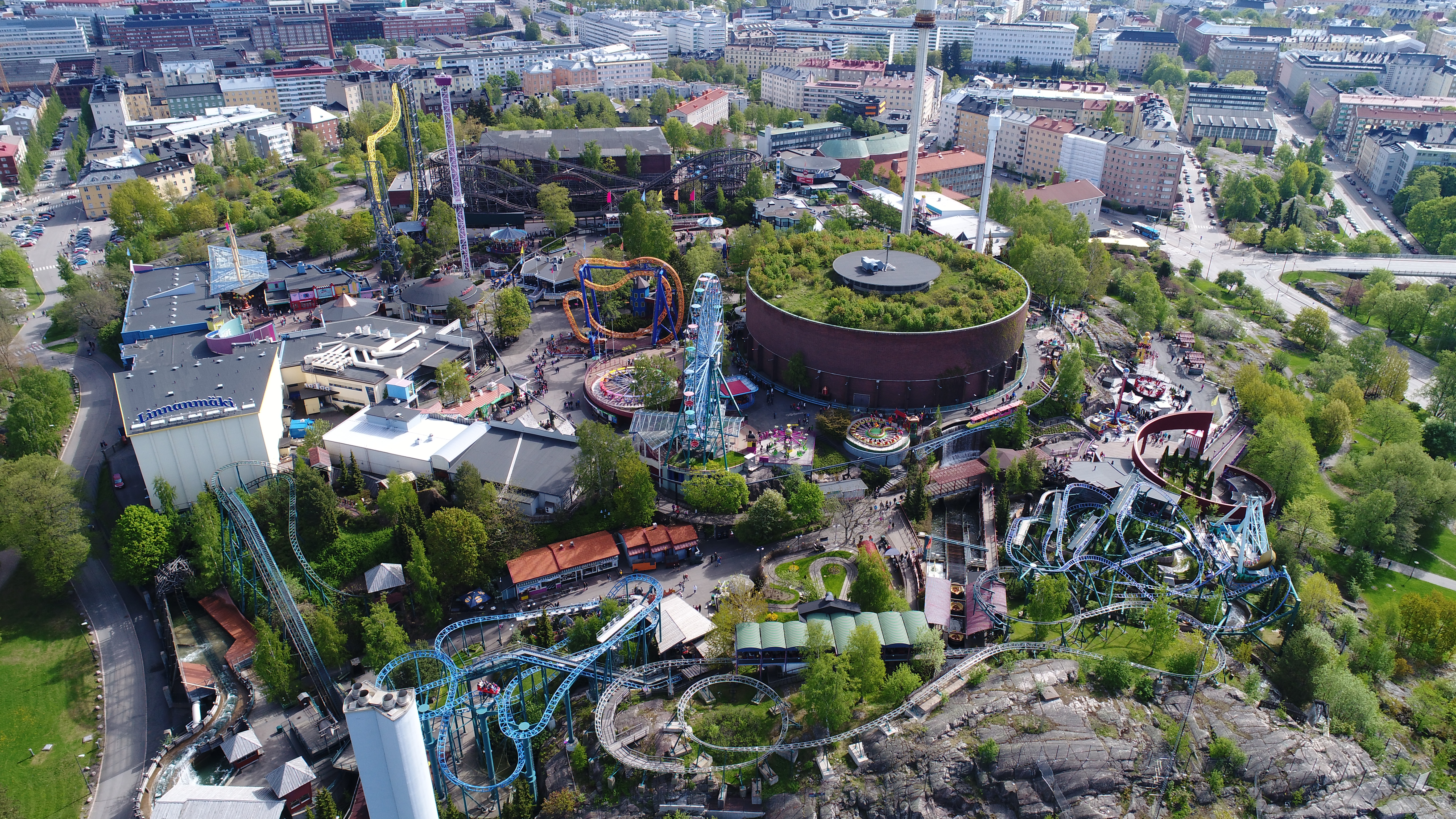 Linnanmäki ilmasta, lännestä päin kuvattuna, 27.5.2017